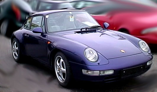 Porsche 911 Carrera (993)Porsche